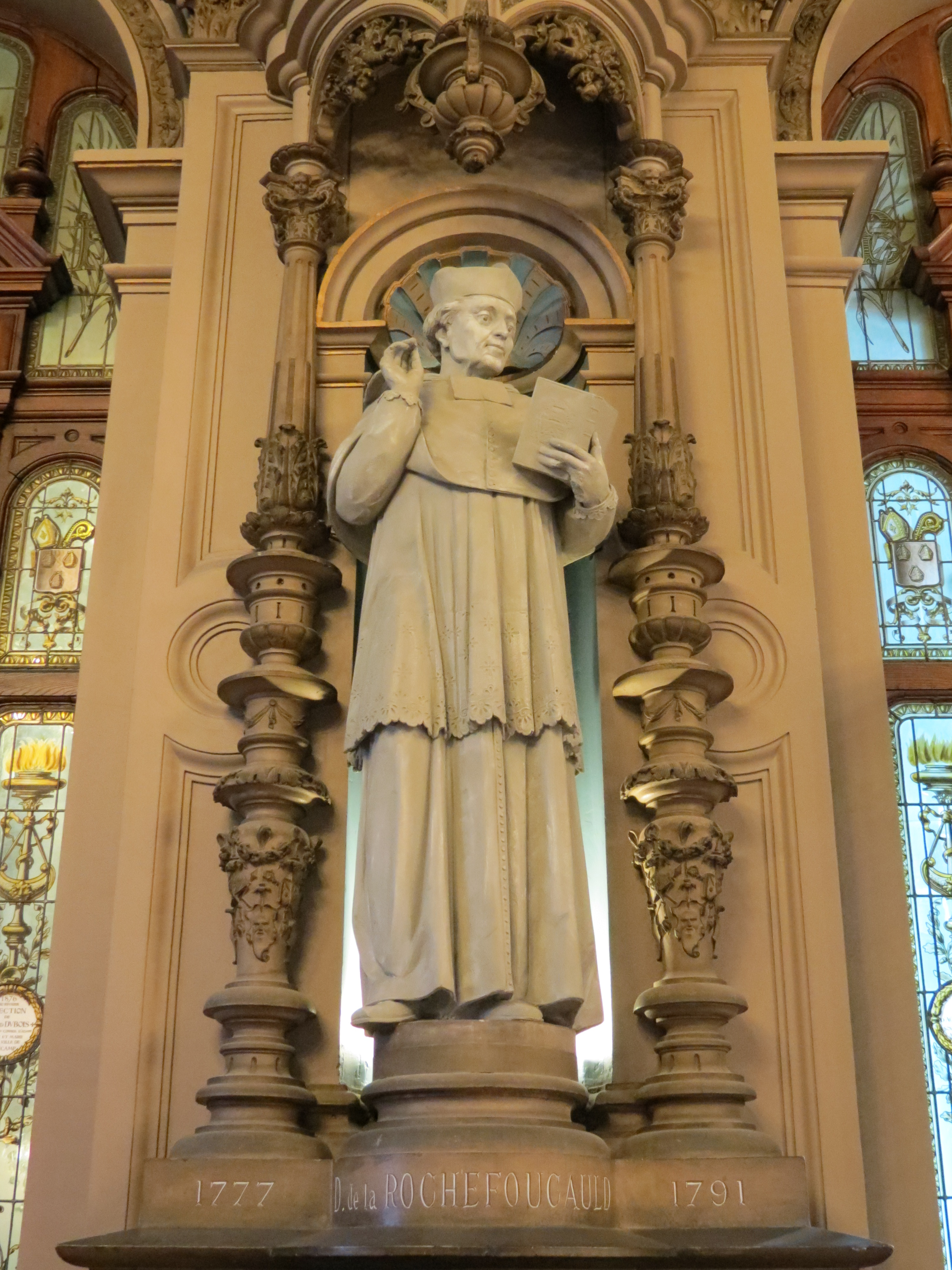 Dominique de La Rochefoucauld, dernier abbé de Fécamp (1778-1791).